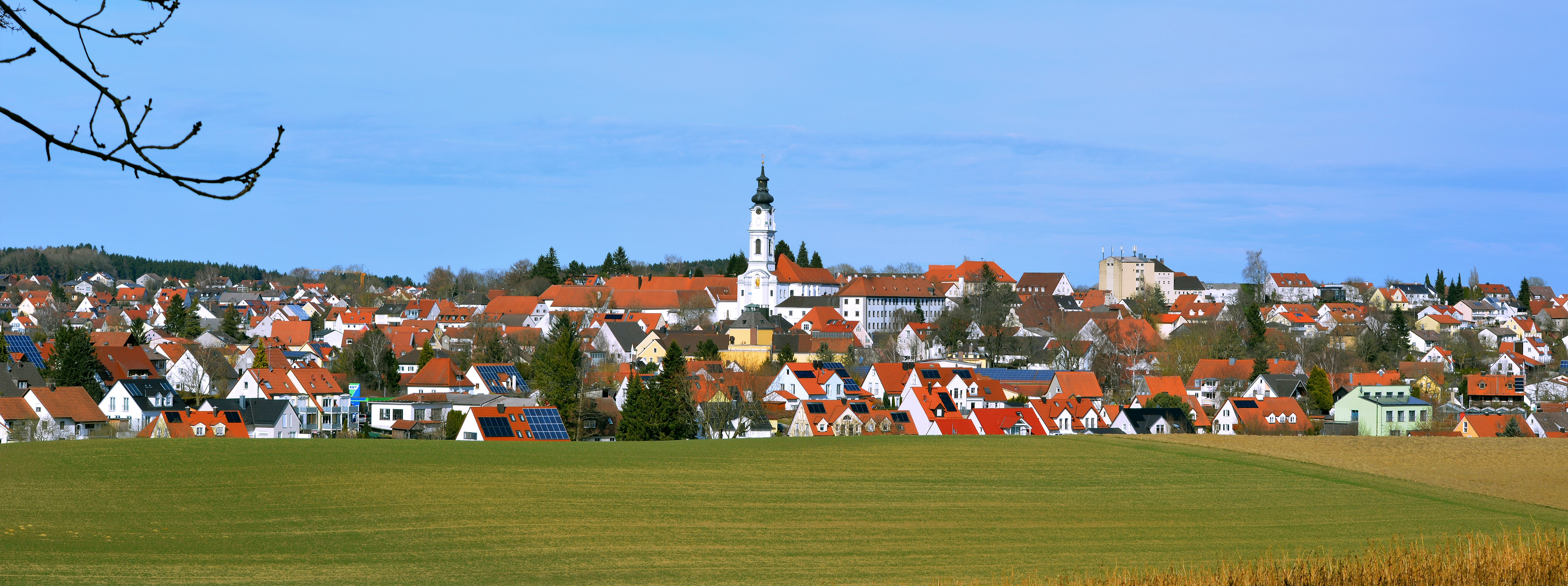 Altomünster, Ortsansicht aus Südosten, 2018